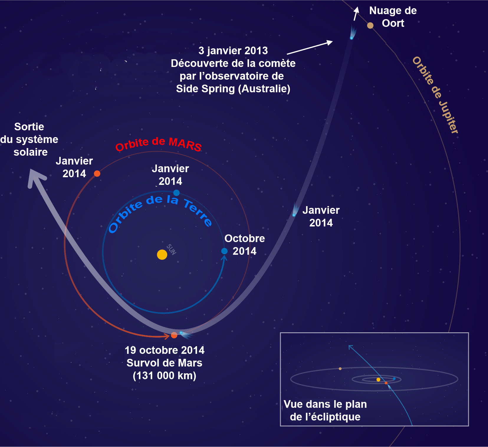 Trajectoire de la comète C/2013 A1 Siding Spring à l'intérieur du système solaire et survol de Mars